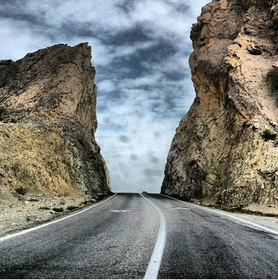 دروازه معروف دامن